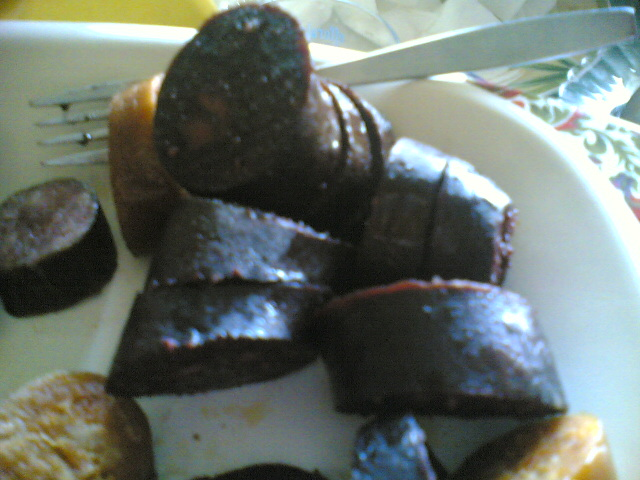 Morcela, a Portuguese blood sausage.